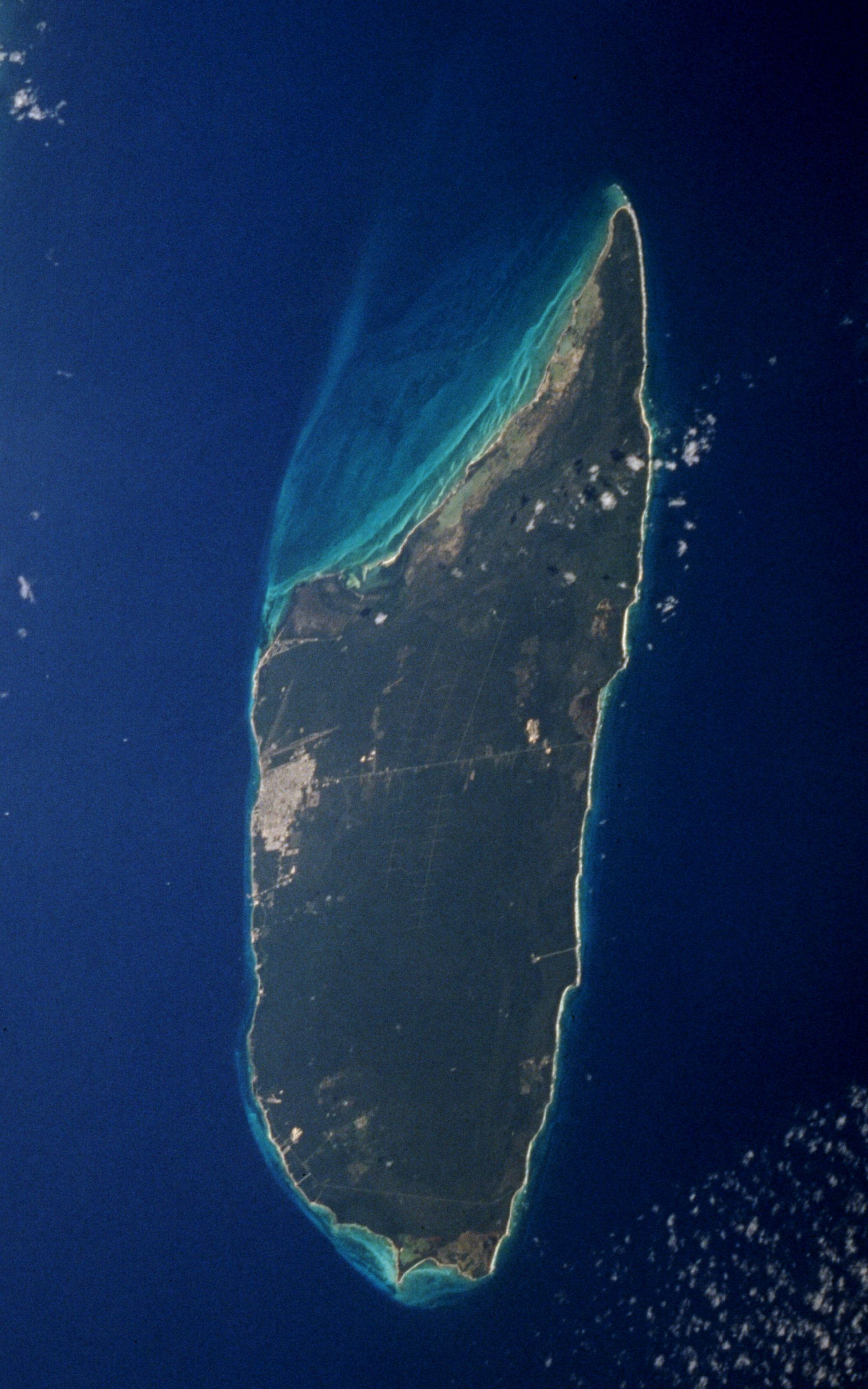 Cozumel Island, Mexico - May 1996